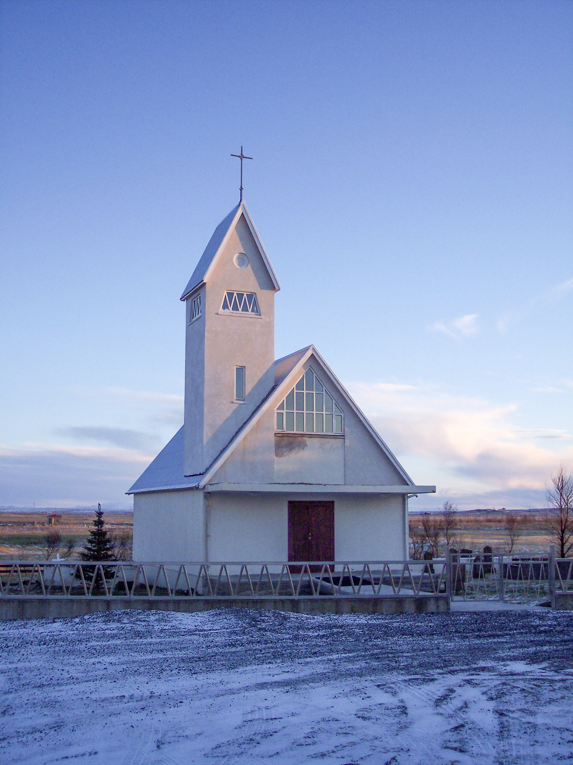 Laugardælakirkja, Árnessýslu